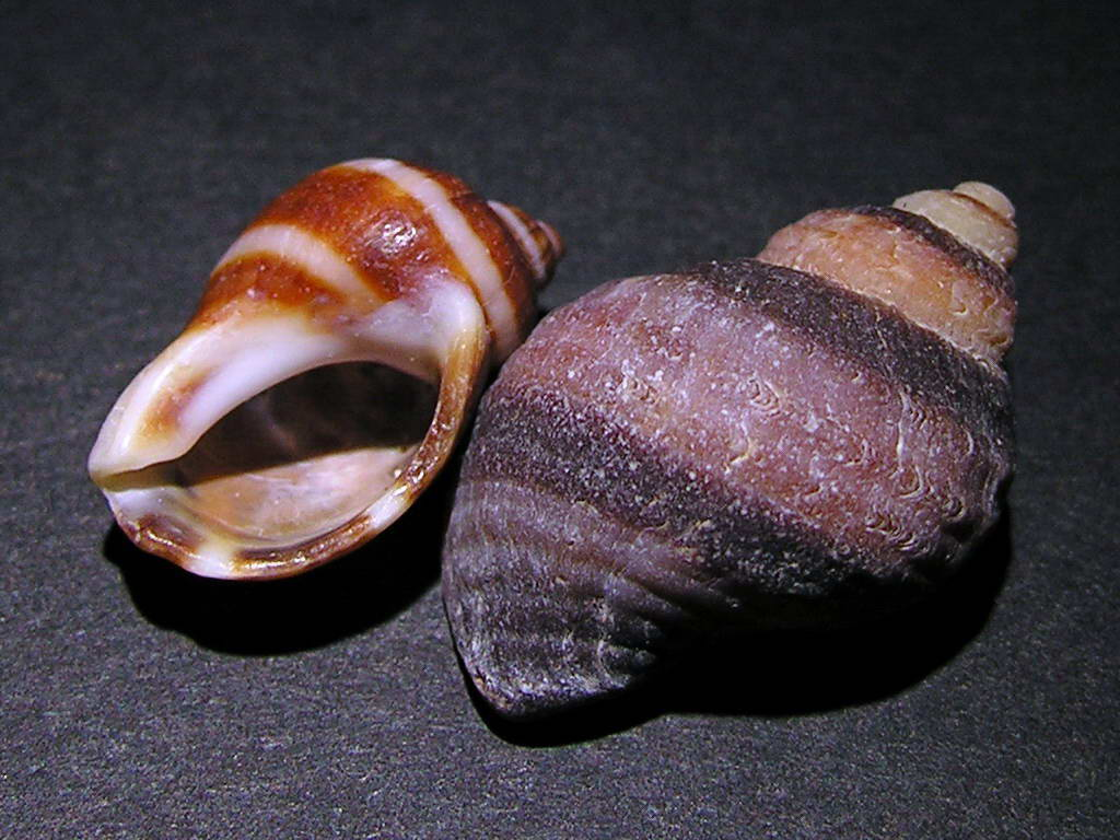 self made Ribeira - Galicia - Spain